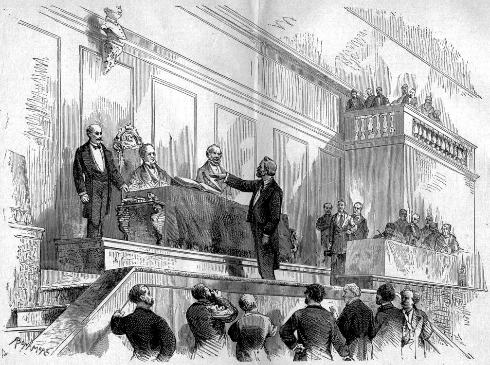 Giuseppe Verdi giura in Senato